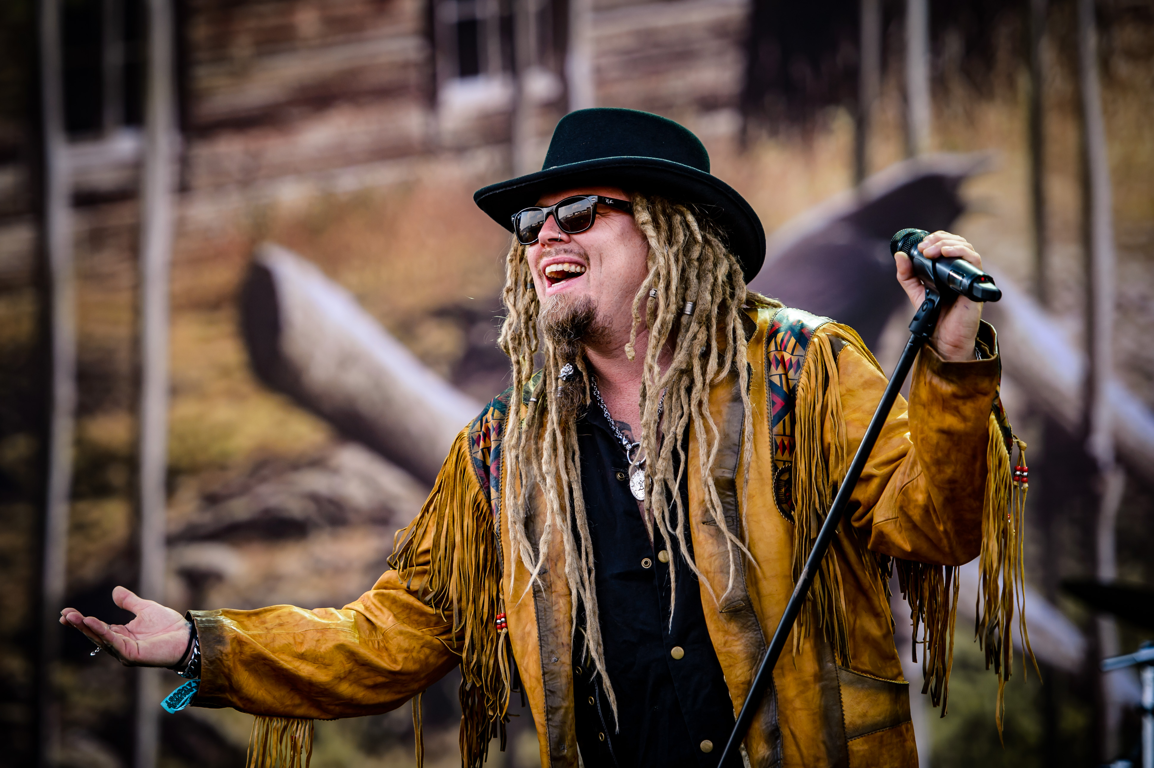 'Summer Breeze Festival 2018; Dinkelsbühl': 'Korpiklaani'